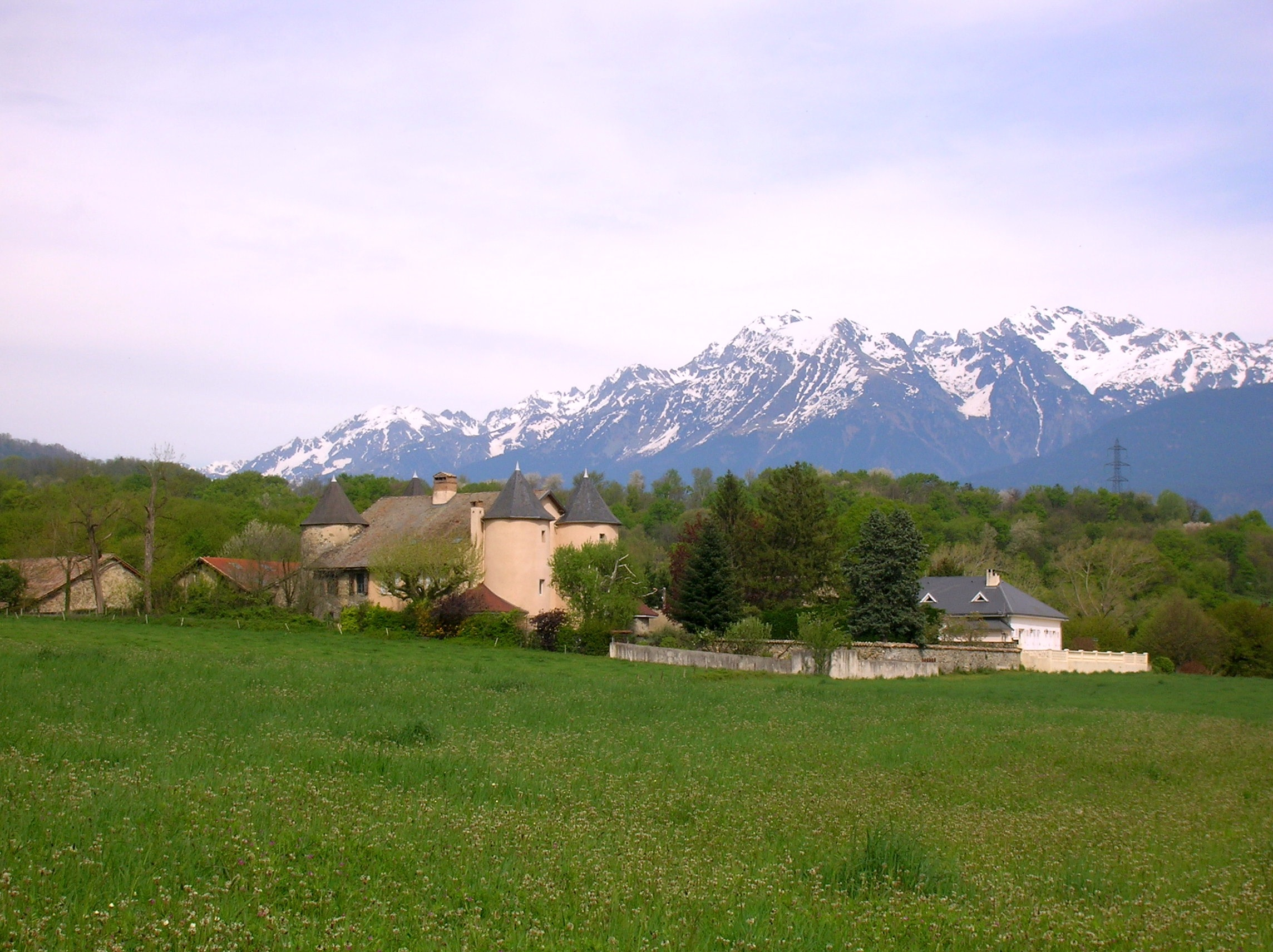 Châteauneuf de Haute-Jarrie, Jarrie, Isère, France.